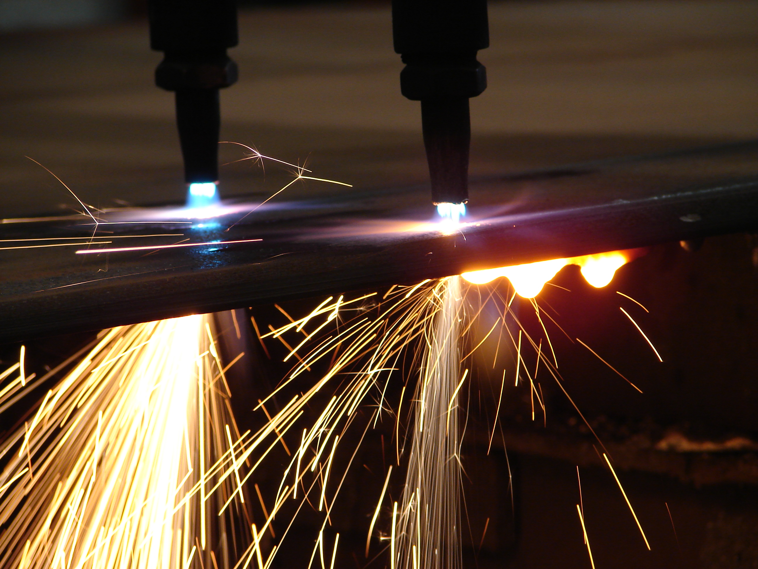 Sistema de corte Oxicorte